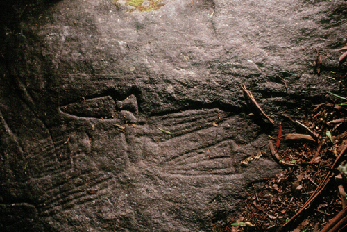 Vista xeral dos gravados do castriño de Conxo en Santiago de Compostela.